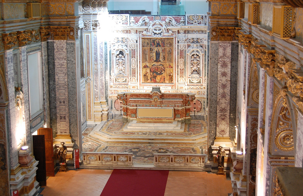 Chiesa di Donnaregina Nuova (Napoli)